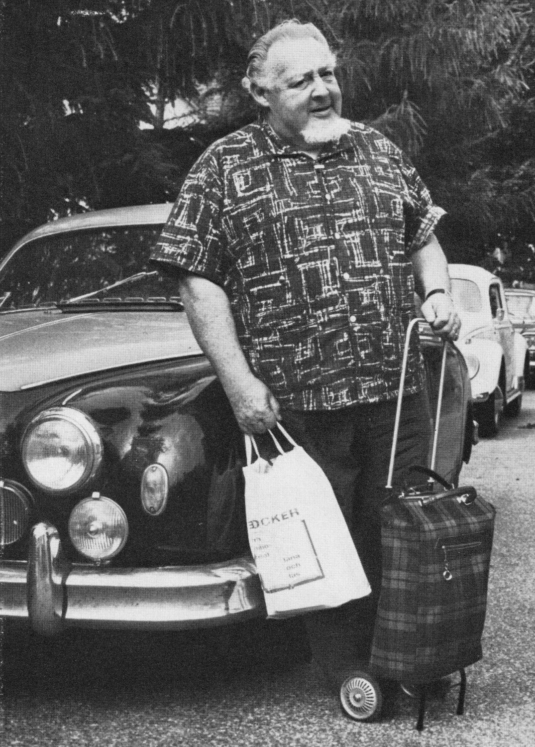 Jury Fränkel vor seinem legendären Jaguar, 1988. Jury Fränkel (* 8. April 1899 in Moskau; † 8. Februar 1971 in Lagny-sur-Marne), Rauchwarenhändler und Kosmopolit, war eine herausragende Persönlichkeit der Pelzbranche. Mit seinem Werk „Rauchwarenhandbuch“ über die Pelztiere und deren Fellarten schuf er die Grundlage für das bis heute bedeutendste Nachschlagewerk der Branche, „Jury Fränkel's Rauchwarenhandbuch“. In der Autobiographie „Einbahnstraße“ schilderte er sein bewegtes Leben mit zwei Weltkriegen, als deutschstämmiger Jude und Pelzhändler in seiner ersten Heimat Russland, dann im Welt-Pelzhandelszentrum Leipziger Brühl und anschließend in Schweden, sowie seine ständigen Reisen zu den Einkaufsstätten für Pelzfelle. Seine letzten Lebensjahre verbrachte er mit seiner Familie in Paris.